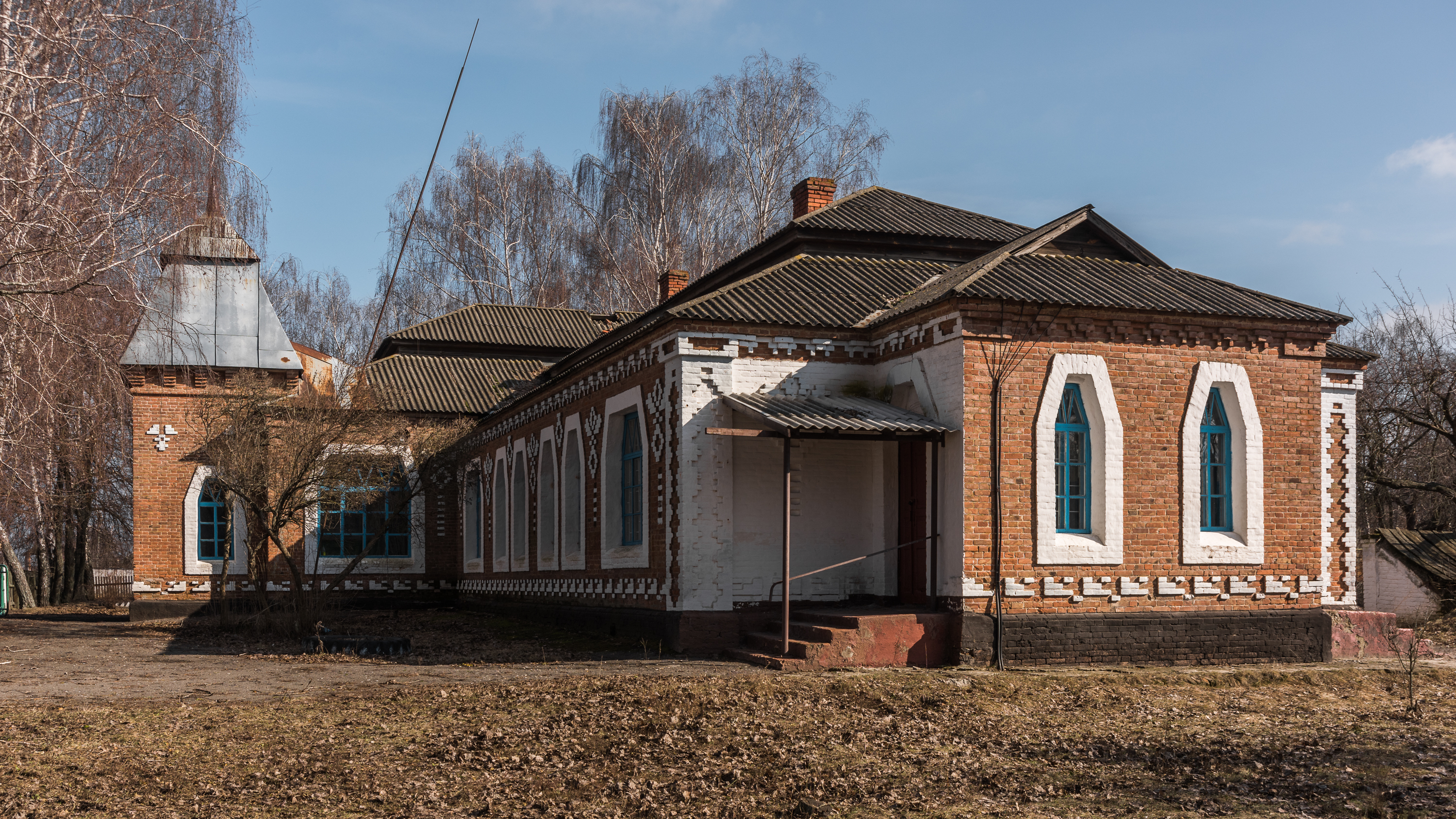 Двокомплектна земська школа в селі Гаївщина (Скоробагатьки Лохвицькі) Лохвицького району Полтавської області. Стиль - український архітектурний модерн. Архітектор Опанас Сластьон.